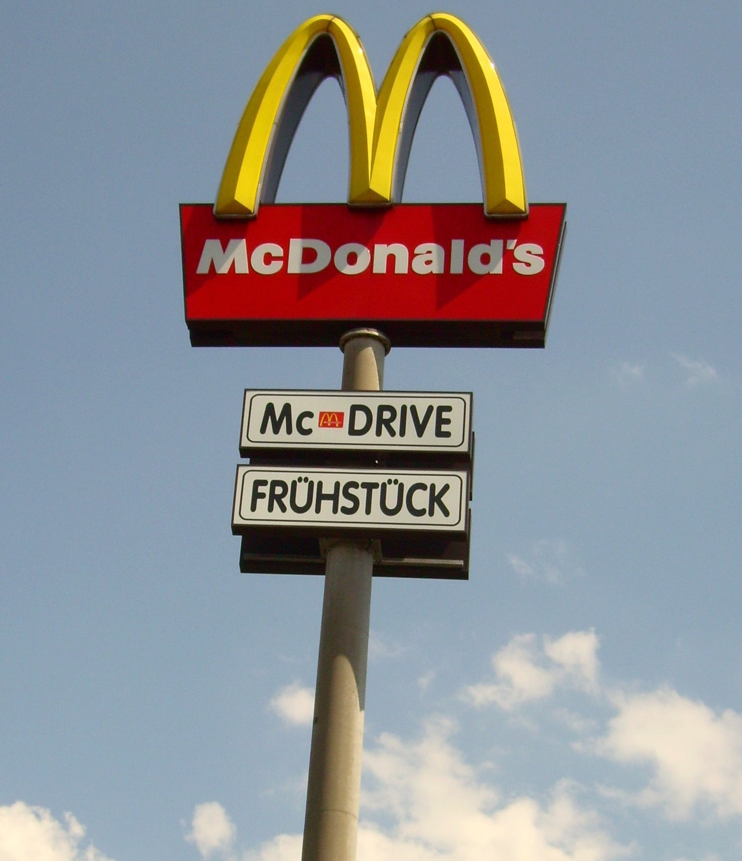 McDonald's Logo an einem Pylon